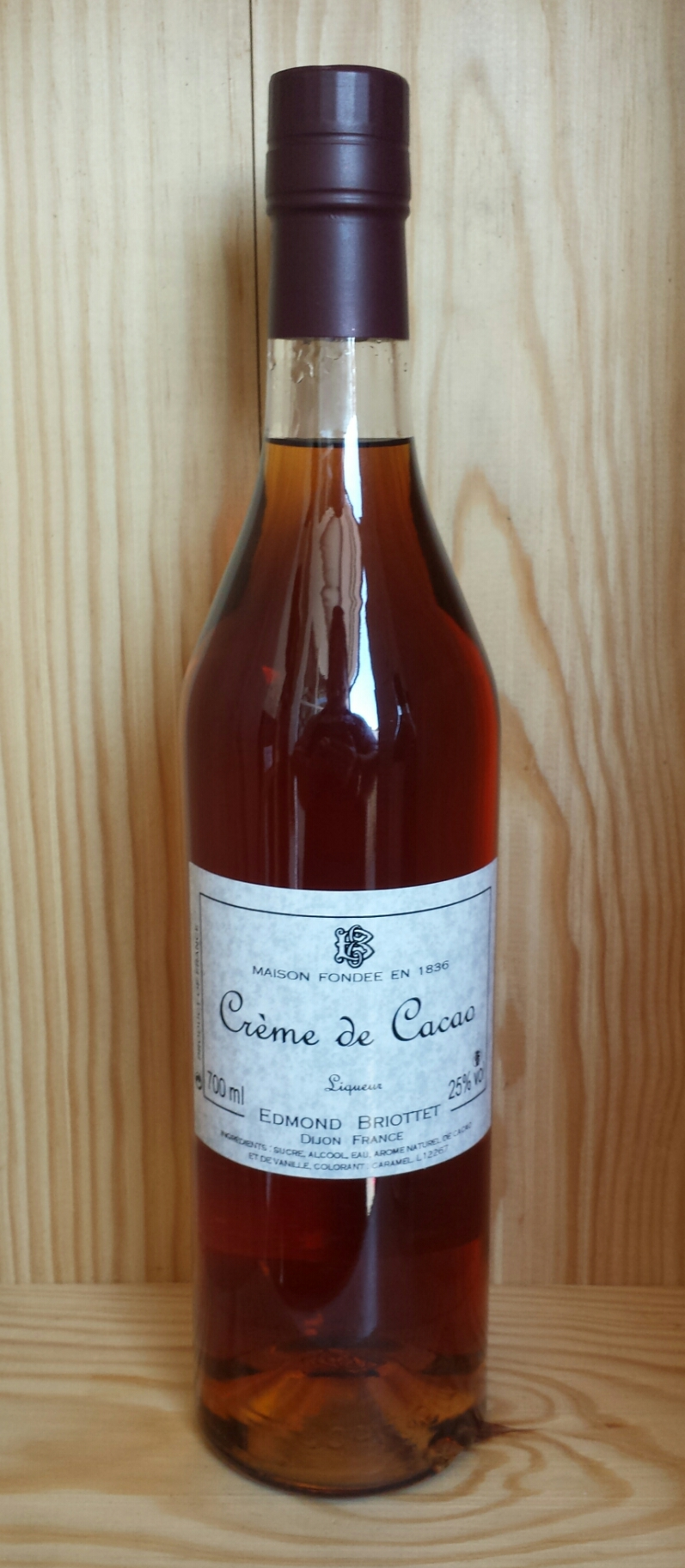 Edmond Briottet Creme de Cacao Brun Liqueur